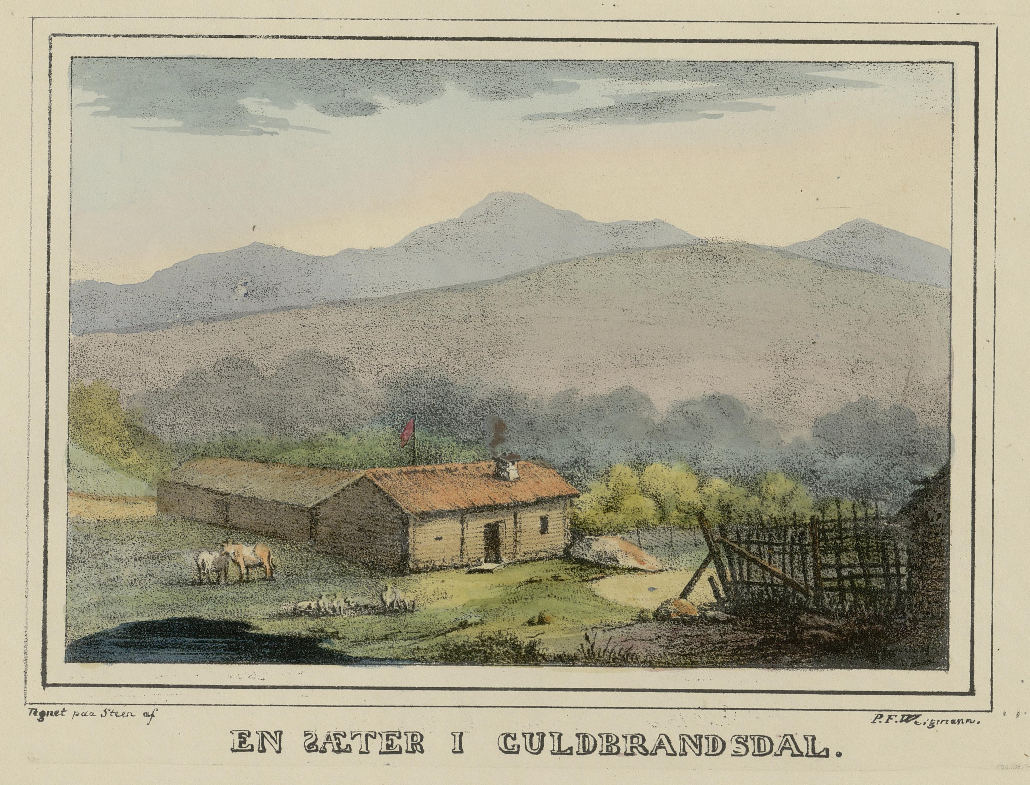 Illustrasjon hentet fra boken "Norsk Prospect-Samling" av Wergmann, P.F. og utgitt av P.F. Wergmann (no, 1833-1836)